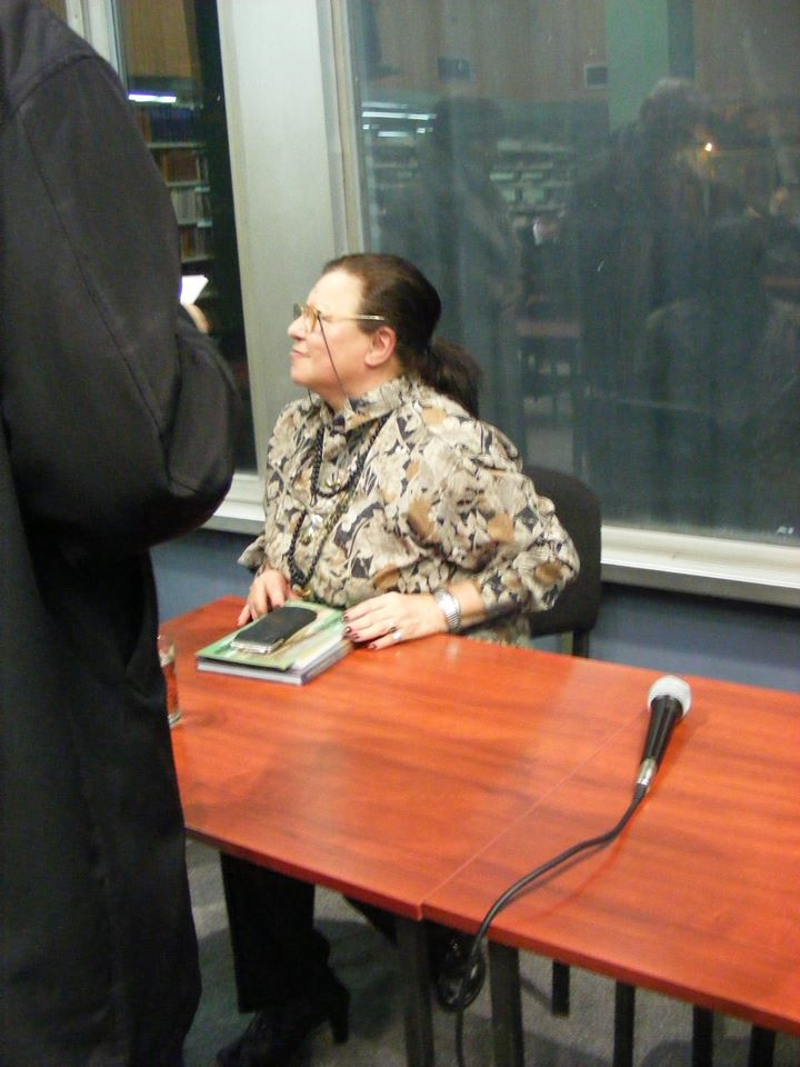 Српски (ћирилица): Дрита Тутуновић на трибини у Панчеву